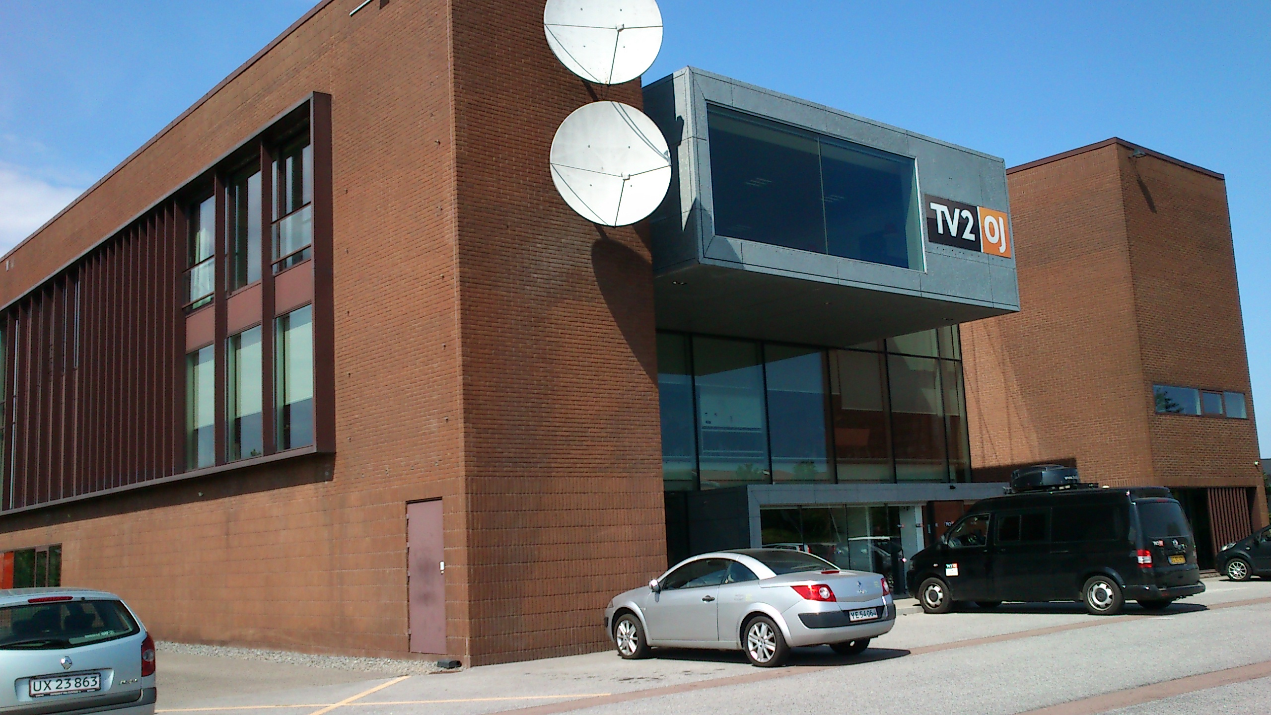 TV2 Østjylland